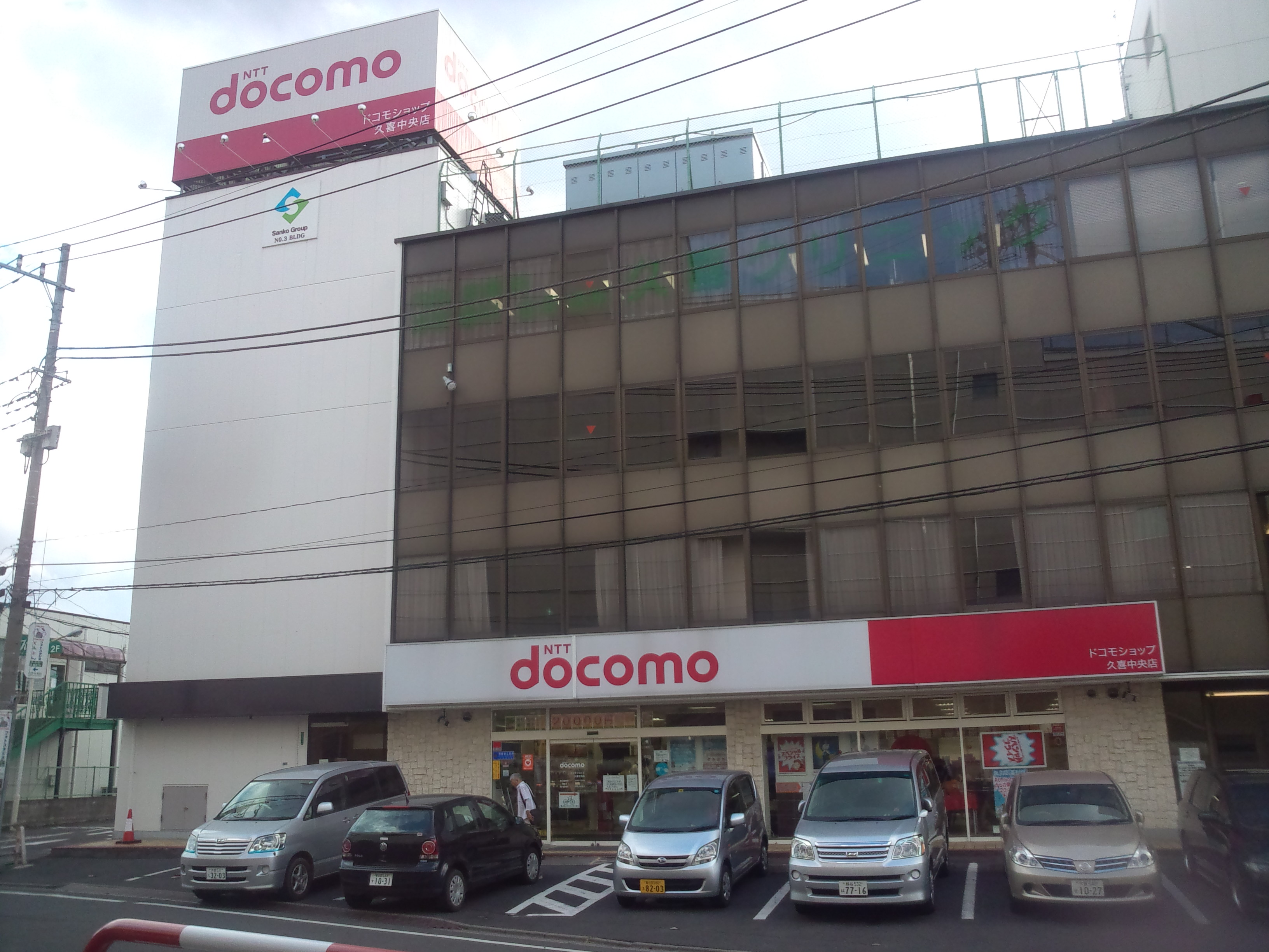 三高第3ビル